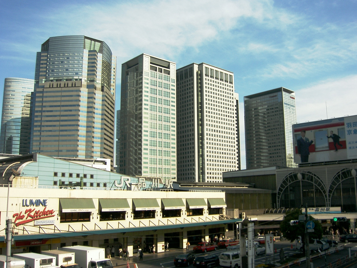 Shinagawa_Station 2007